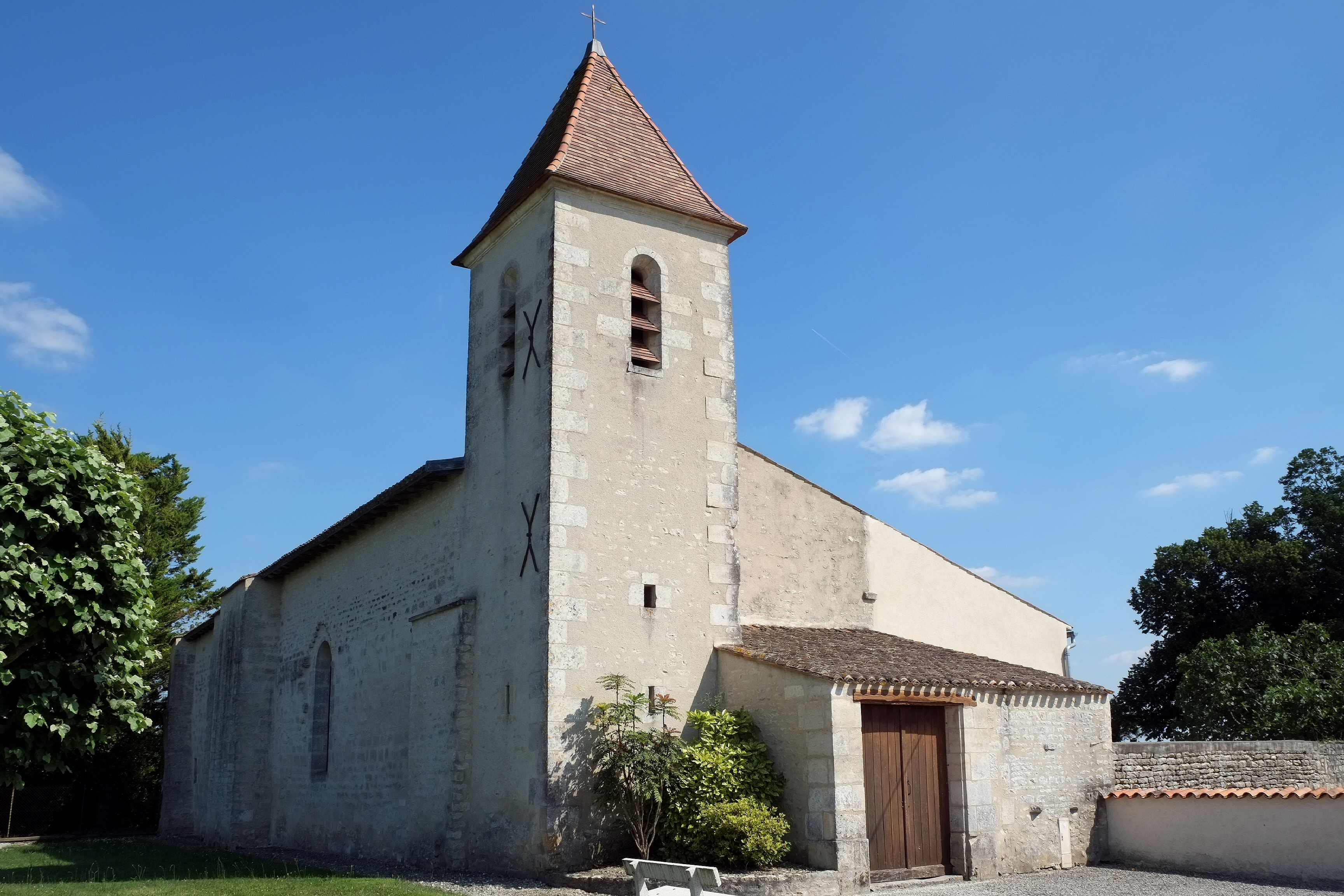 Église Saint-Pierre Cramchaban Charente-Maritime France